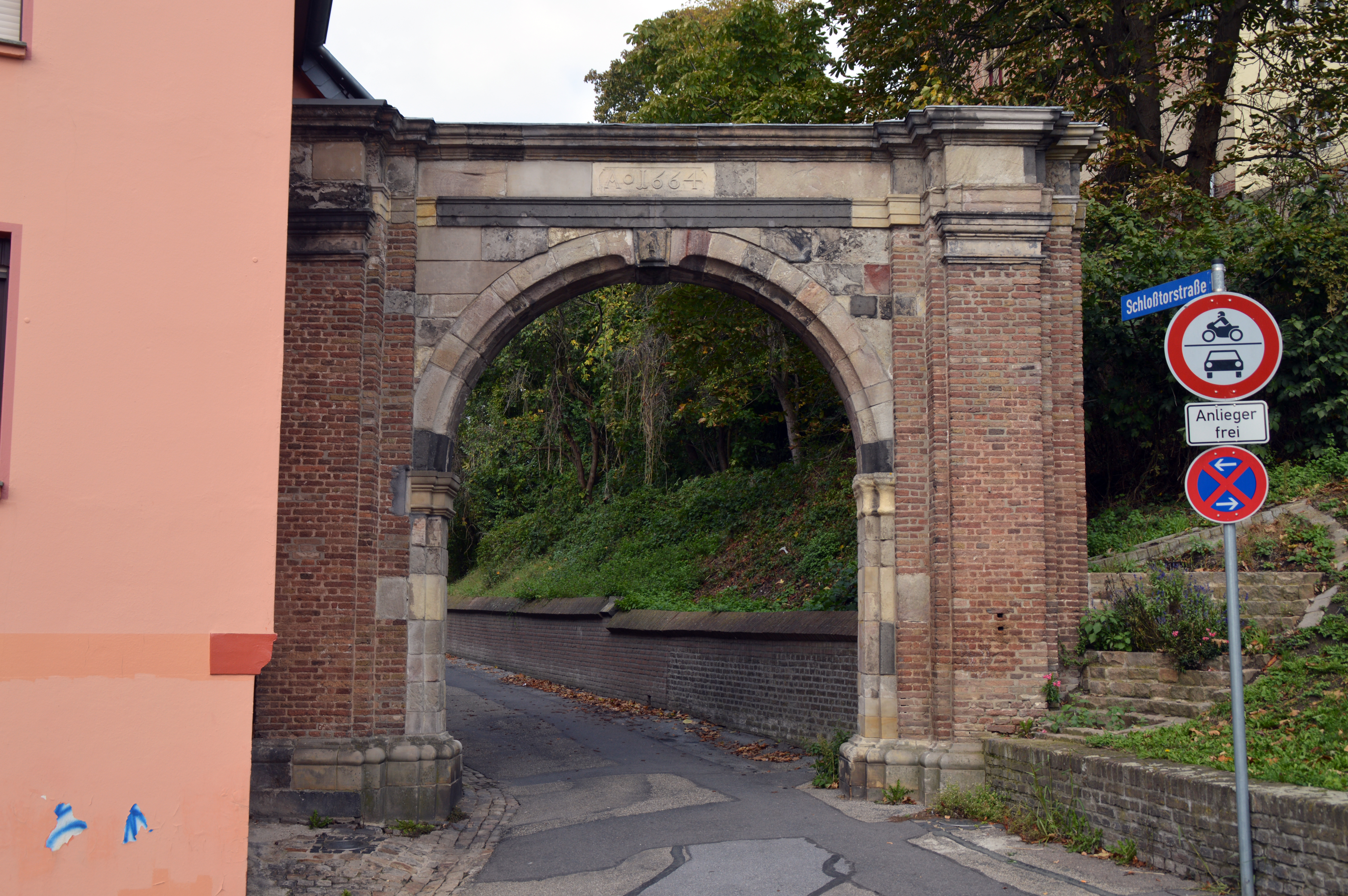 Schwanenburg Castle Kleve, Kleef, Zwanenburcht, Шваненбург (Клеве) Zwingertor gate, poort 1664